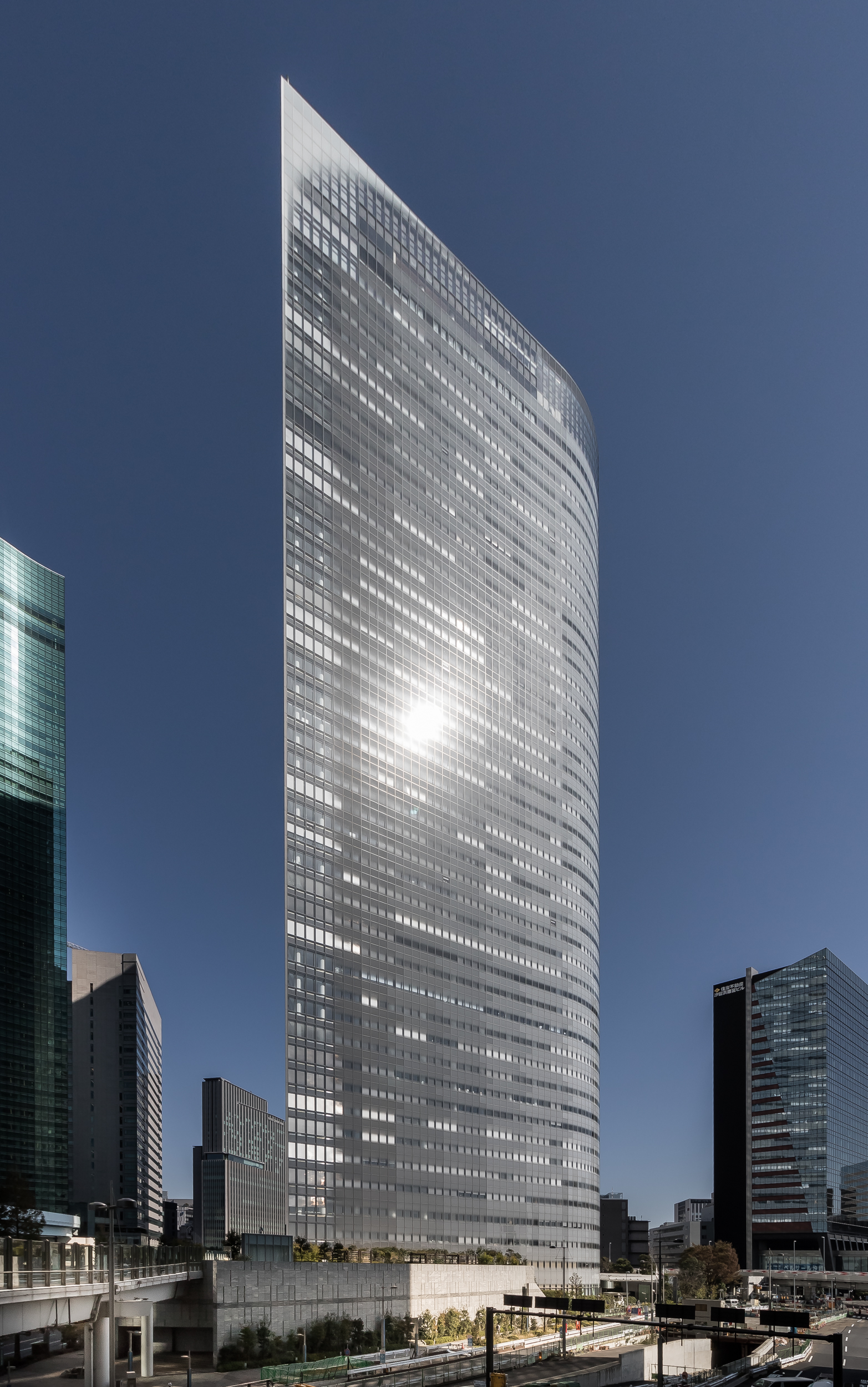 電通本社屋、東京都港区.設計-大林組東京本社、デザイン・パートナー-ジャン・ヌーヴェル.